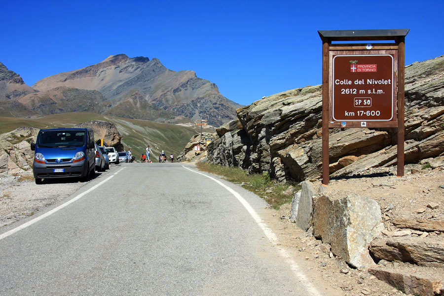 Il Colle del Nivolet al confine tra Piemonte e Valle d'Aosta